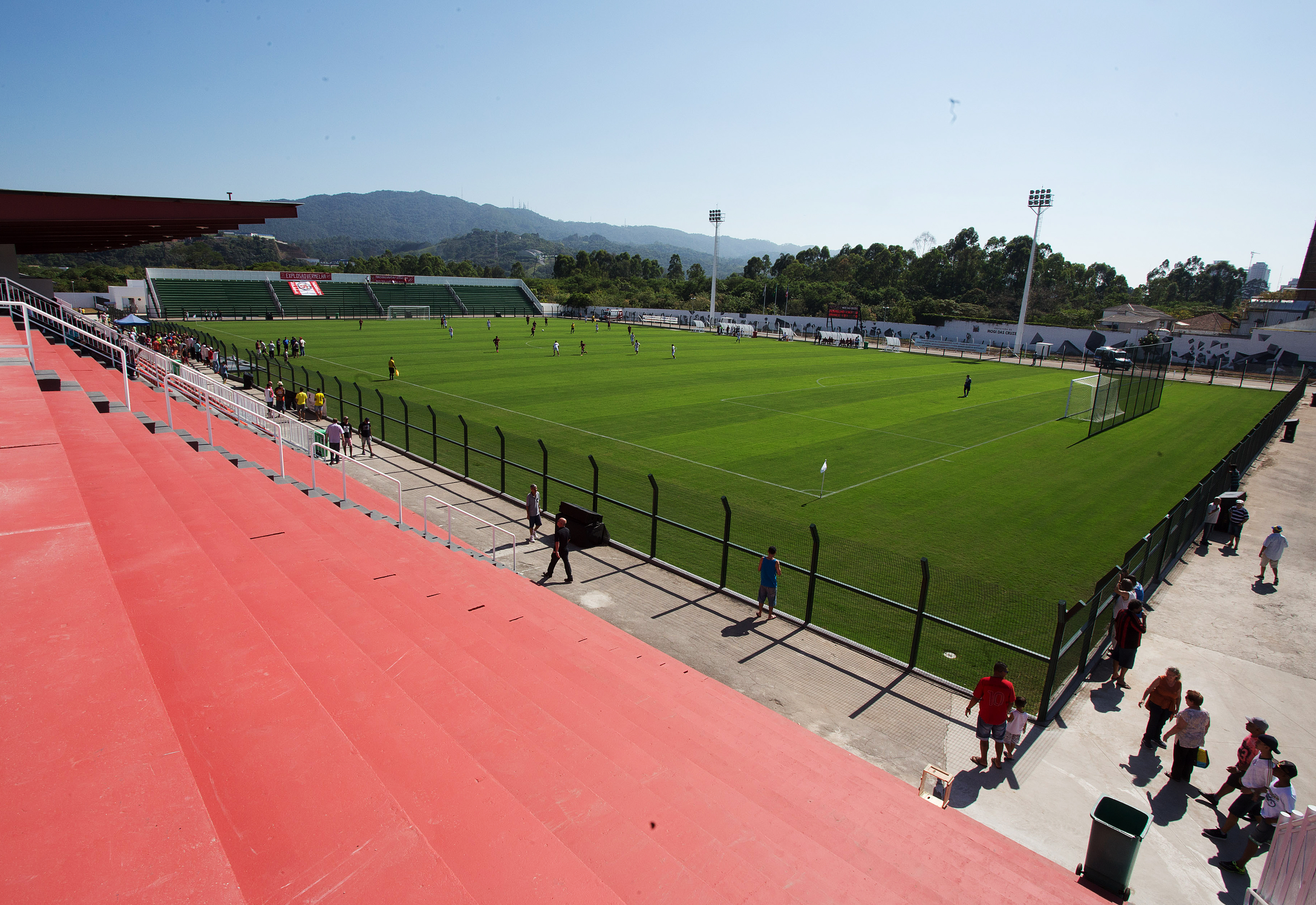 Reinauguração do Estádio Municipal Francisco Ribeiro Nogueira, o Nogueirão.